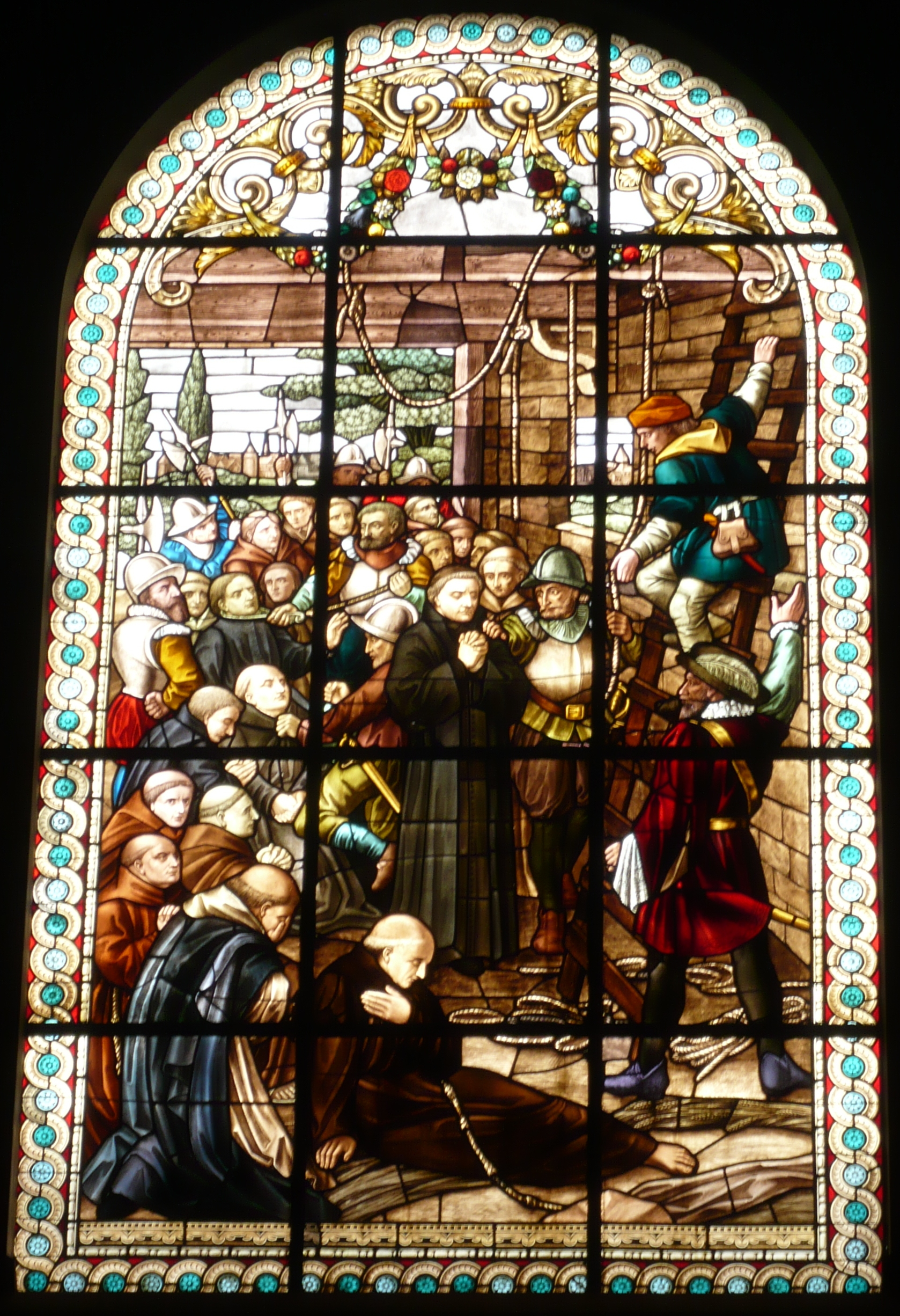 Martelaren van Gorkum, Jules Dobbelaere (1822-1885), Glas-in-lood raam, Sint-Josephkerk, Haarlem (onlangs gerestaureerd)